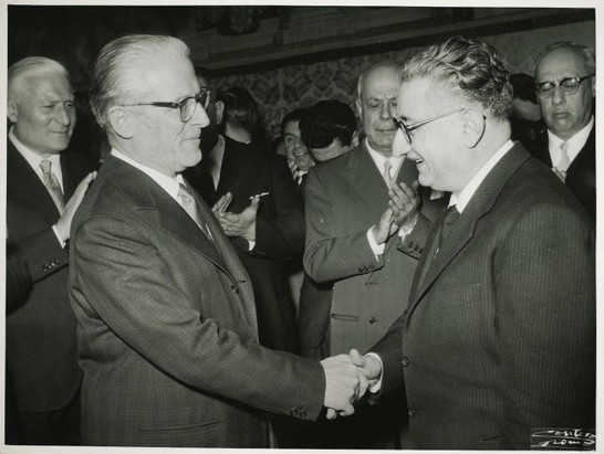 Auguri della Camera al Capo dello Stato Giovanni Gronchi